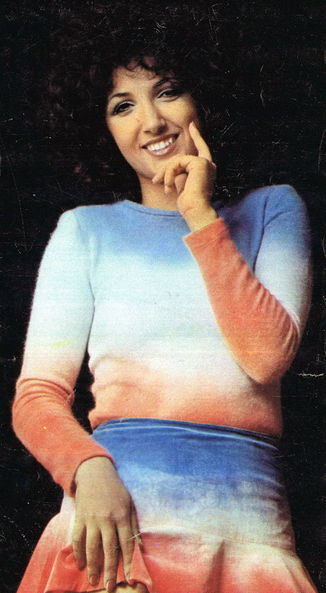 Italian singer Marcella Bella